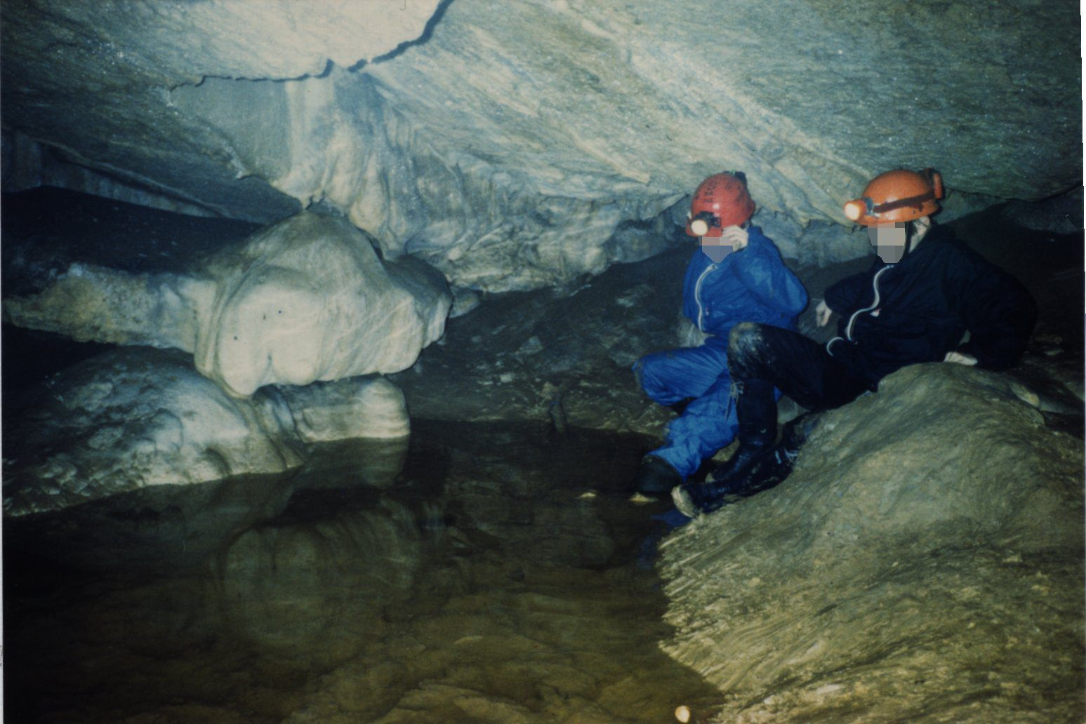 Grotte des Faux-Monayeurs, Suisse.